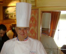 Paul Bocuse le 16 juin 2007 dans son auberge de Collonges-au-Mont-d'Or.